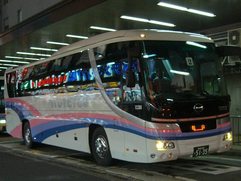 登録番号 愛媛200か51-35 伊予鉄道所属 オレンジライナーえひめ号用 2006年8月23日 新宿西口高速バスターミナルにて撮影